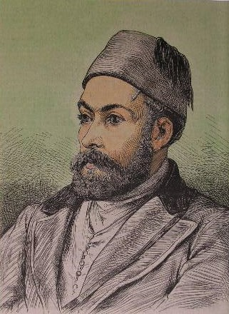 Gazi Osman Paşa, teilkolorierter Holzstich, ca. 14,5 x 12,5 cm